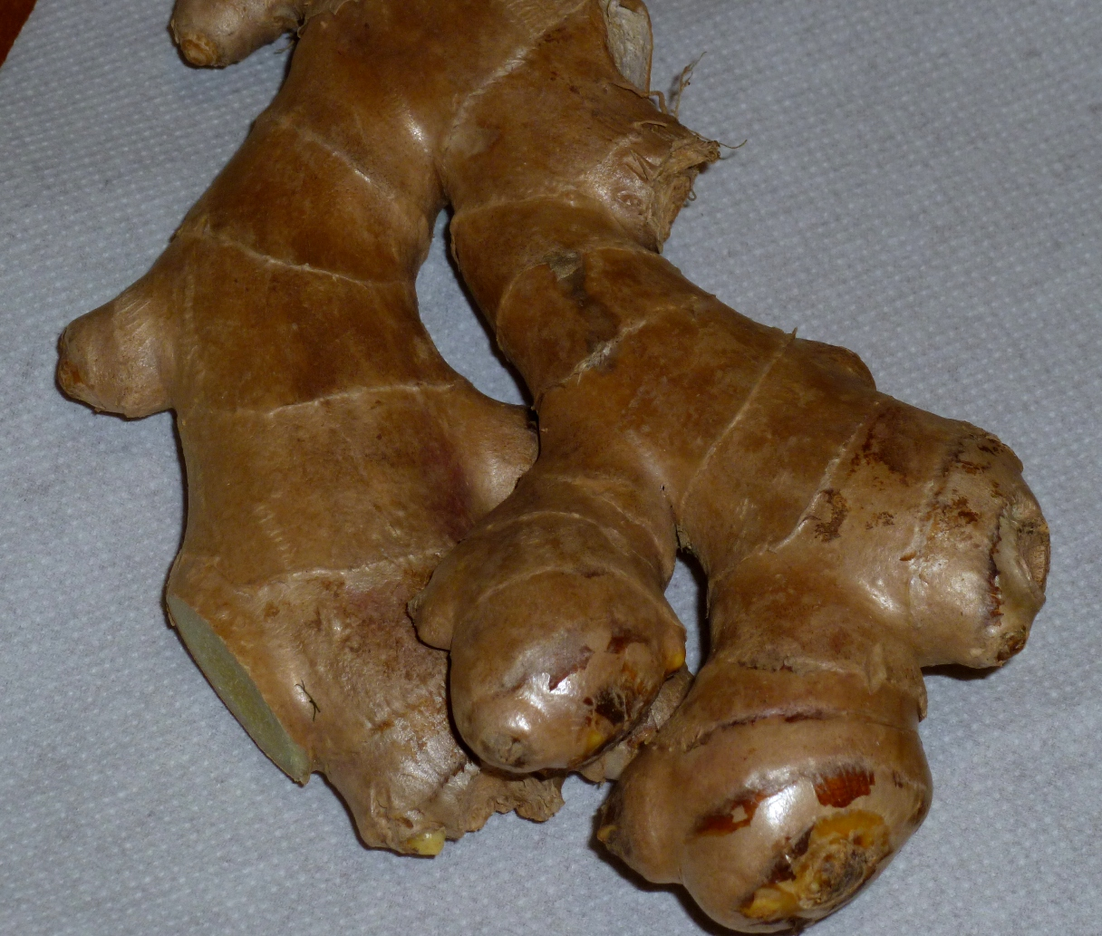 Tubero di tanio.